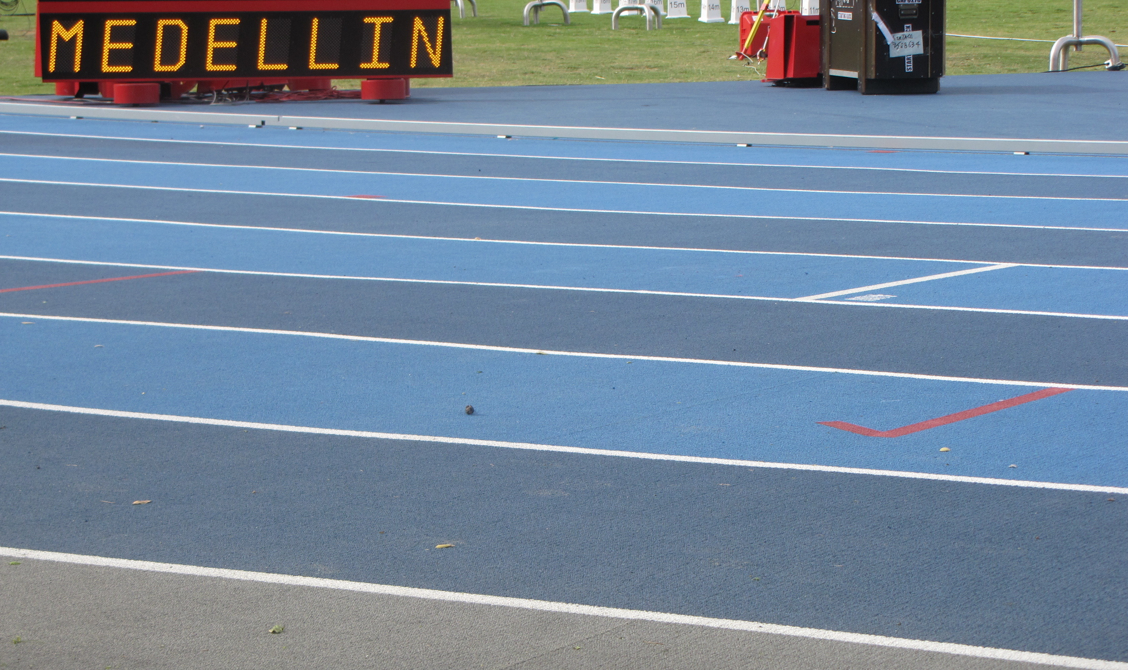 Estadio Alfonso Galvis - Unidad Deportiva Atanasio Girardot - Medellín 2010 - Colombia